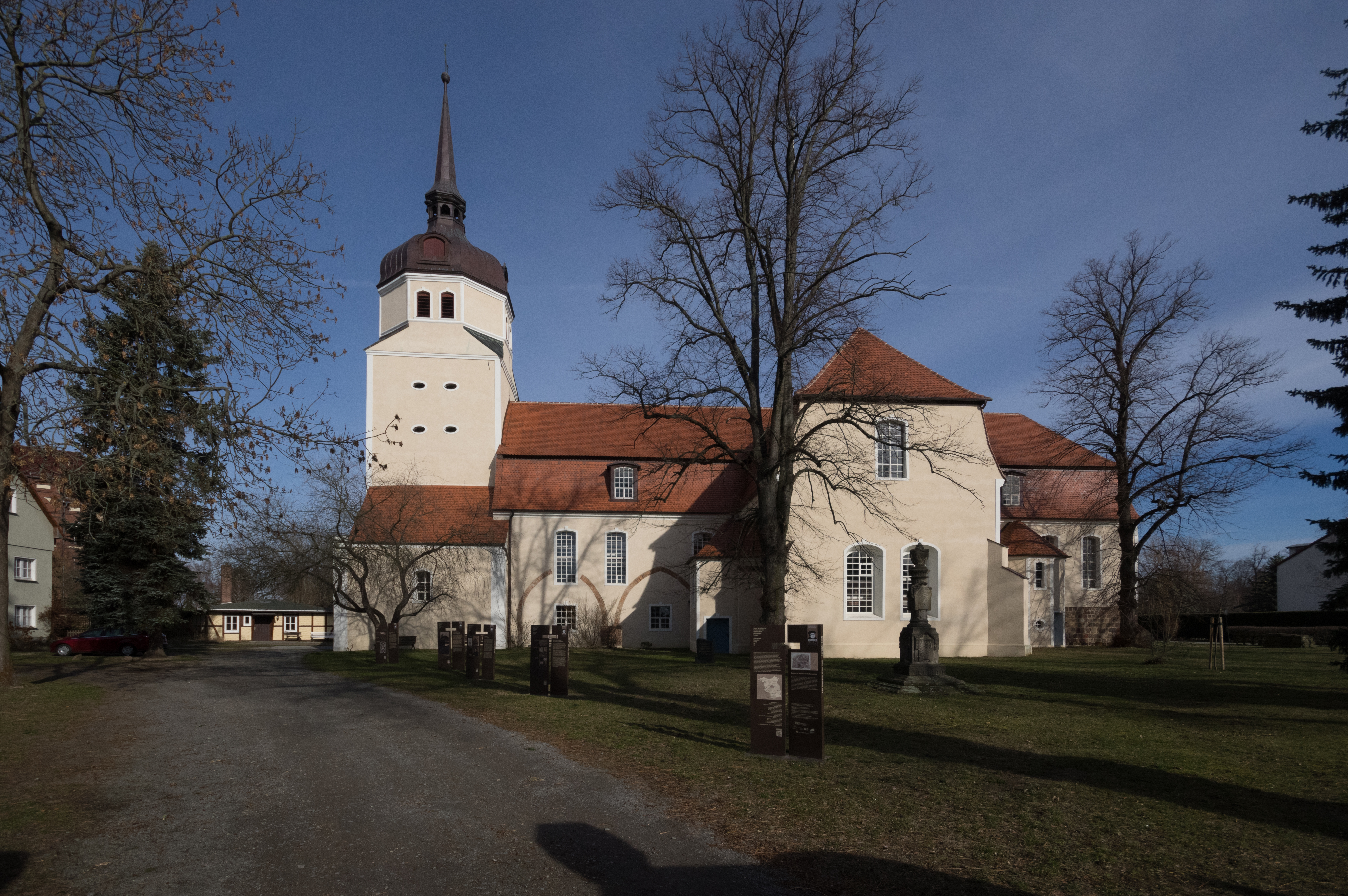 Dahme/Mark in Brandenburg. Die Kirche wurde 1670 nach einem Brand wieder aufgebaut. Sie steht unter Denkmalschutz.